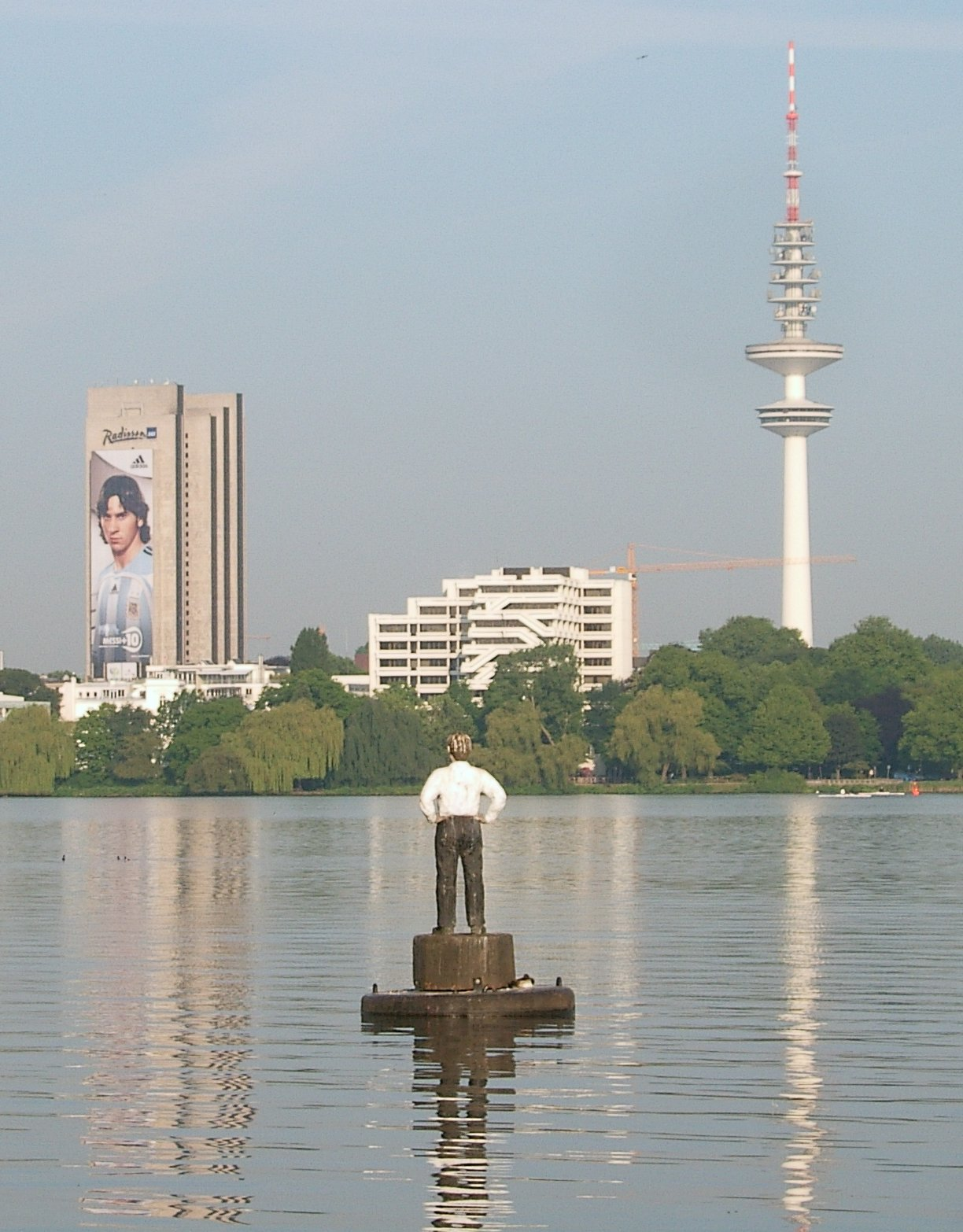 Hamburg, Außenalster. Im Hintergrund links das Congress Centrum Hamburg mit dem Radisson SAS Hotel und rechts der Heinrich-Hertz-Turm.